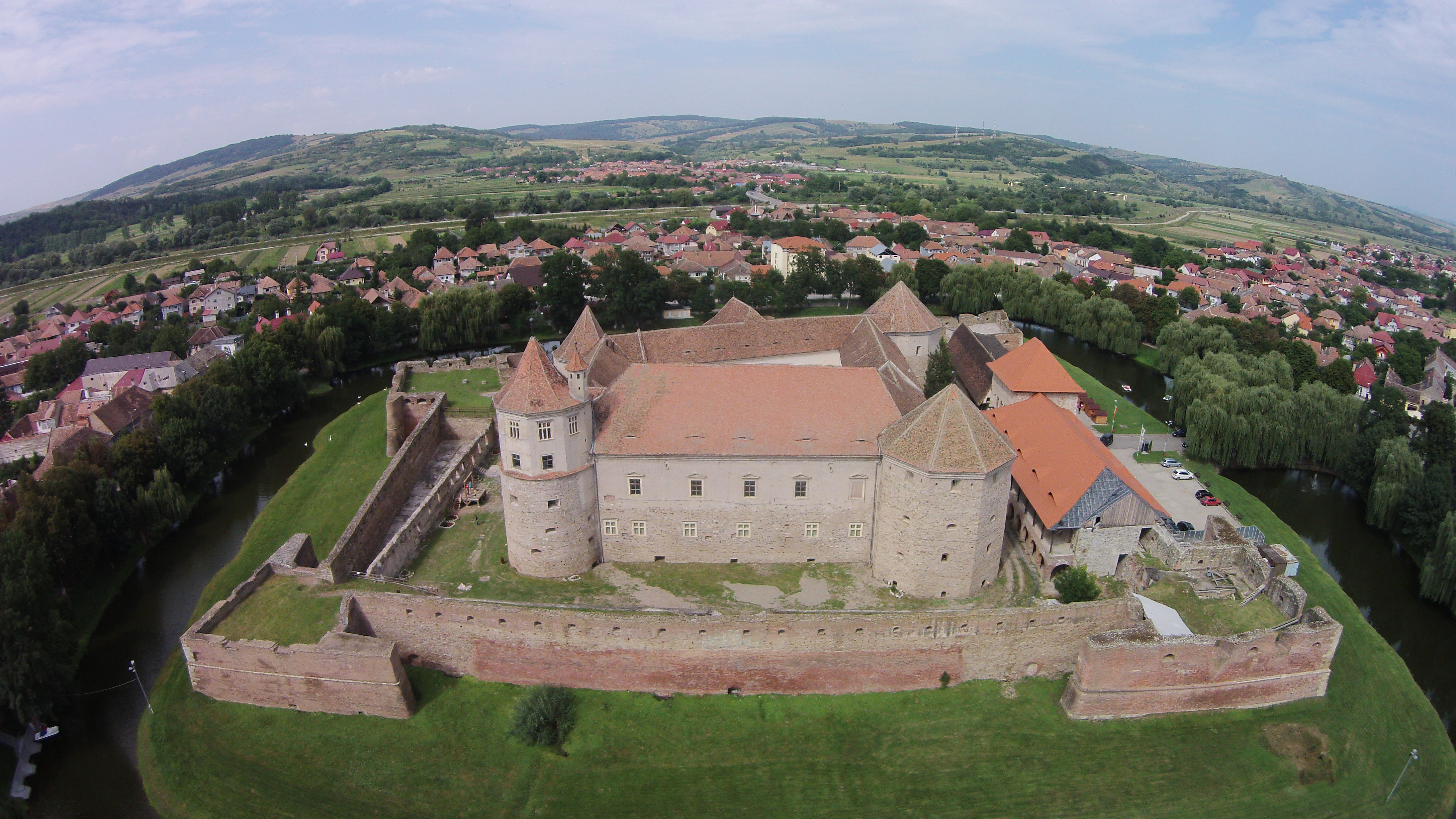 Cetatea Făgăraș-vedere aeriana